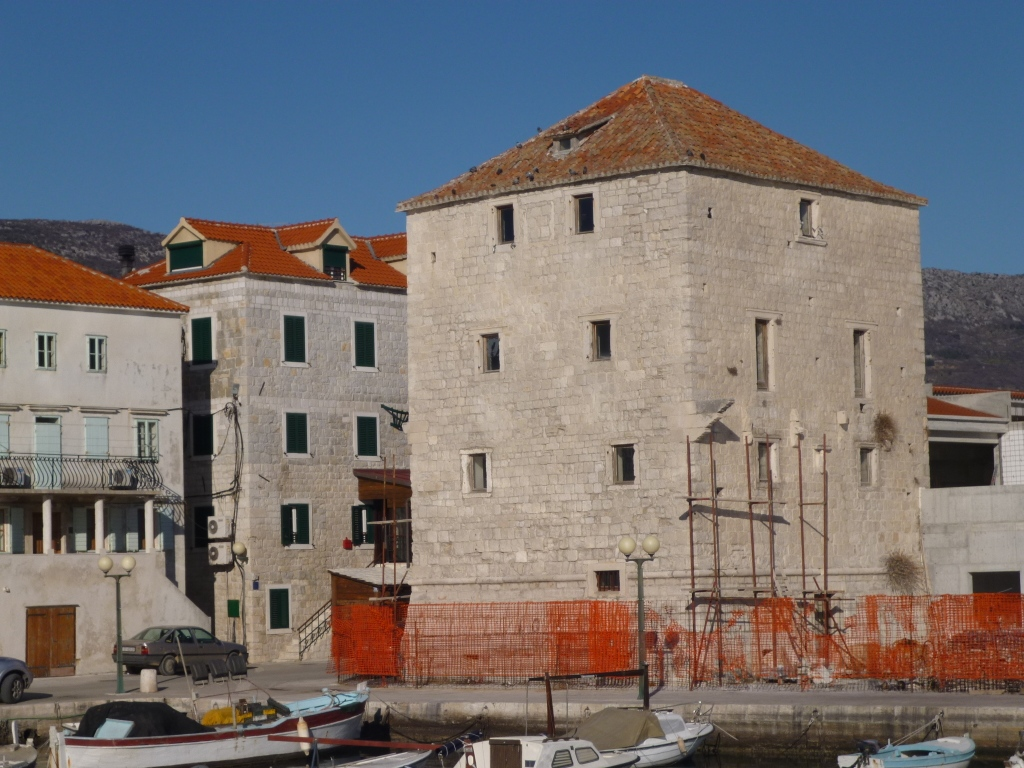 Kaštel Pavla Ćipika u Kaštel Novom